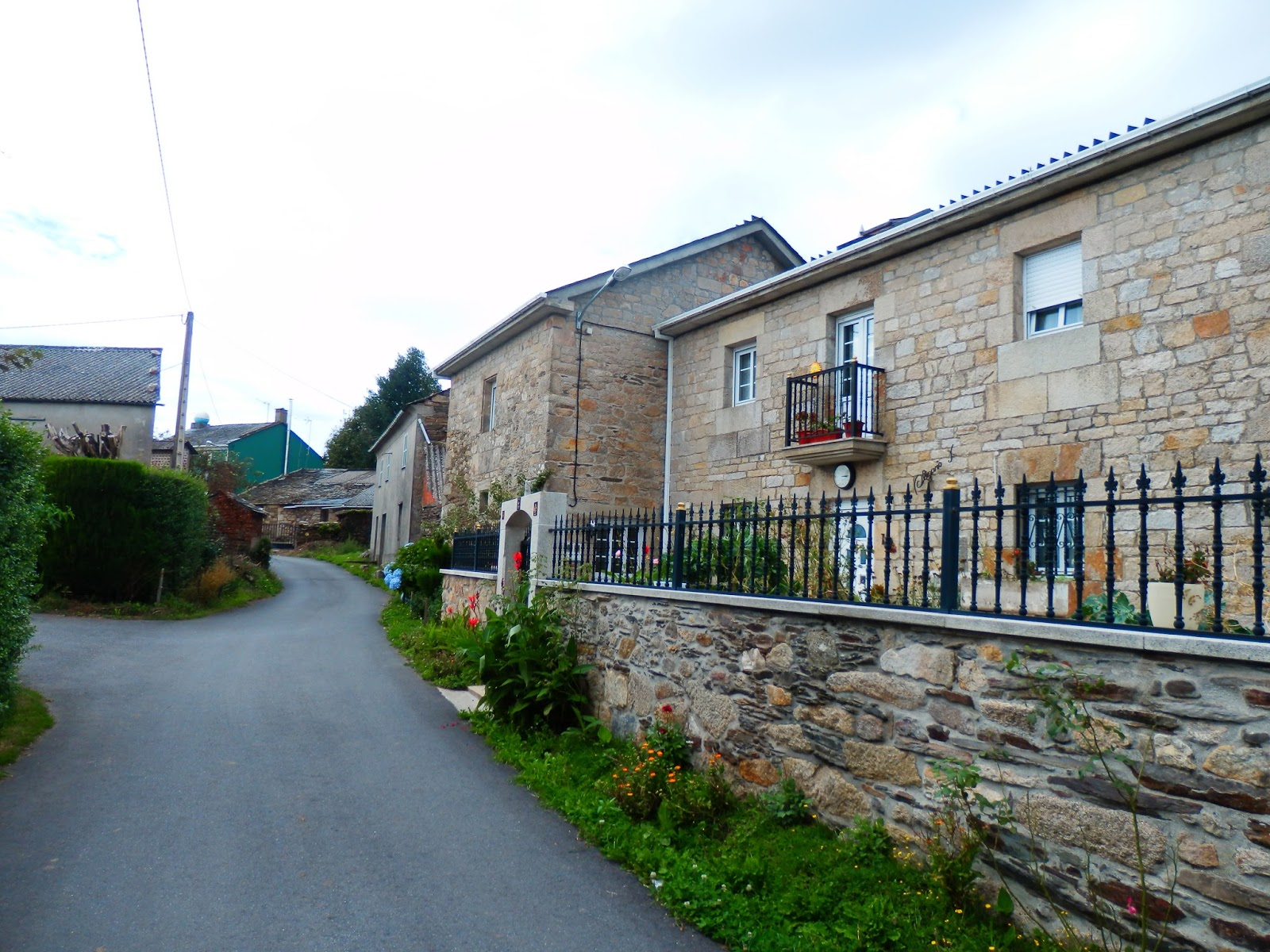 Ver título.